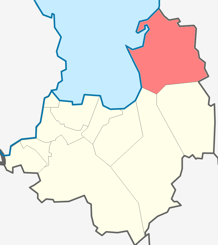 Суховское сельское поселение Кировского района Ленинградской области.